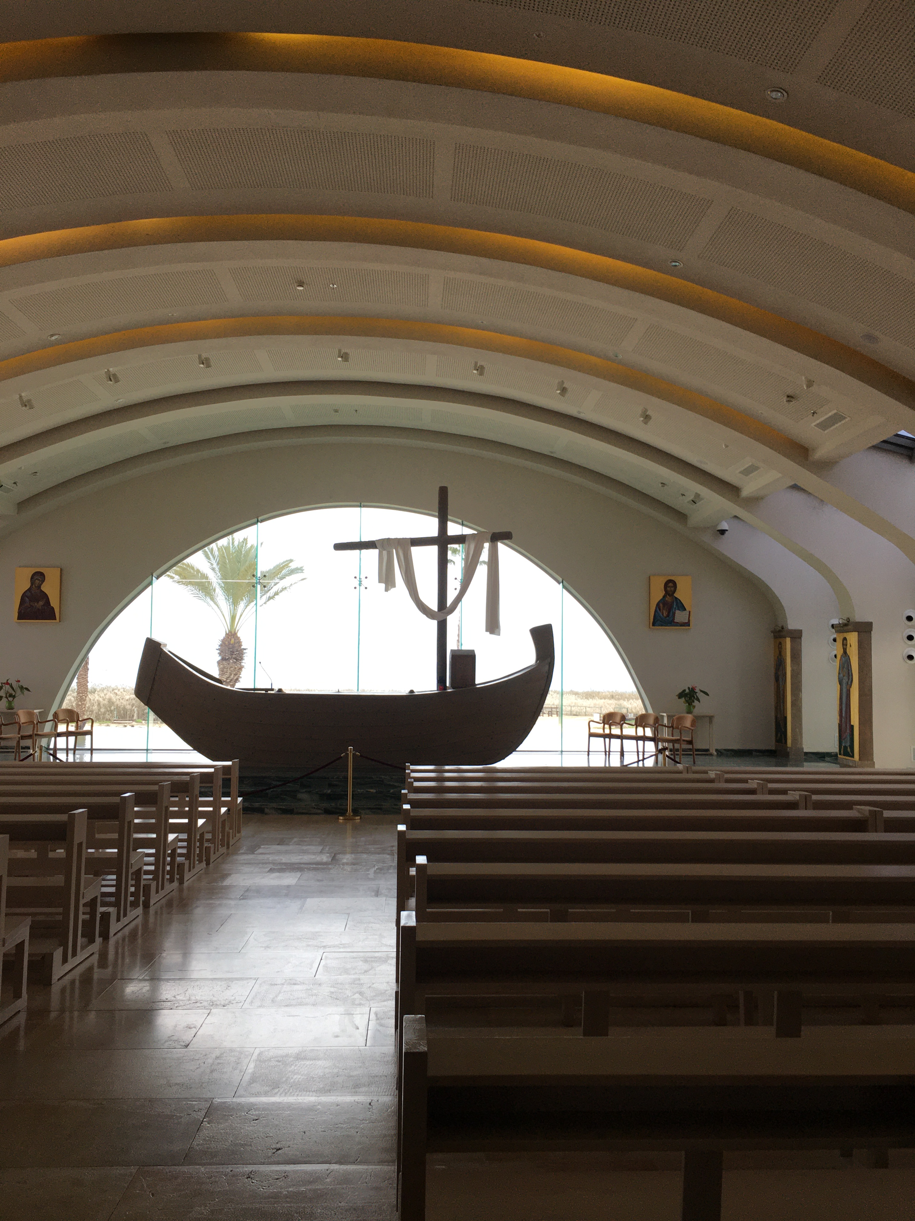 Современная церковь Марии Магдалины на месте археологических раскопок древней Магдалы (Израиль)